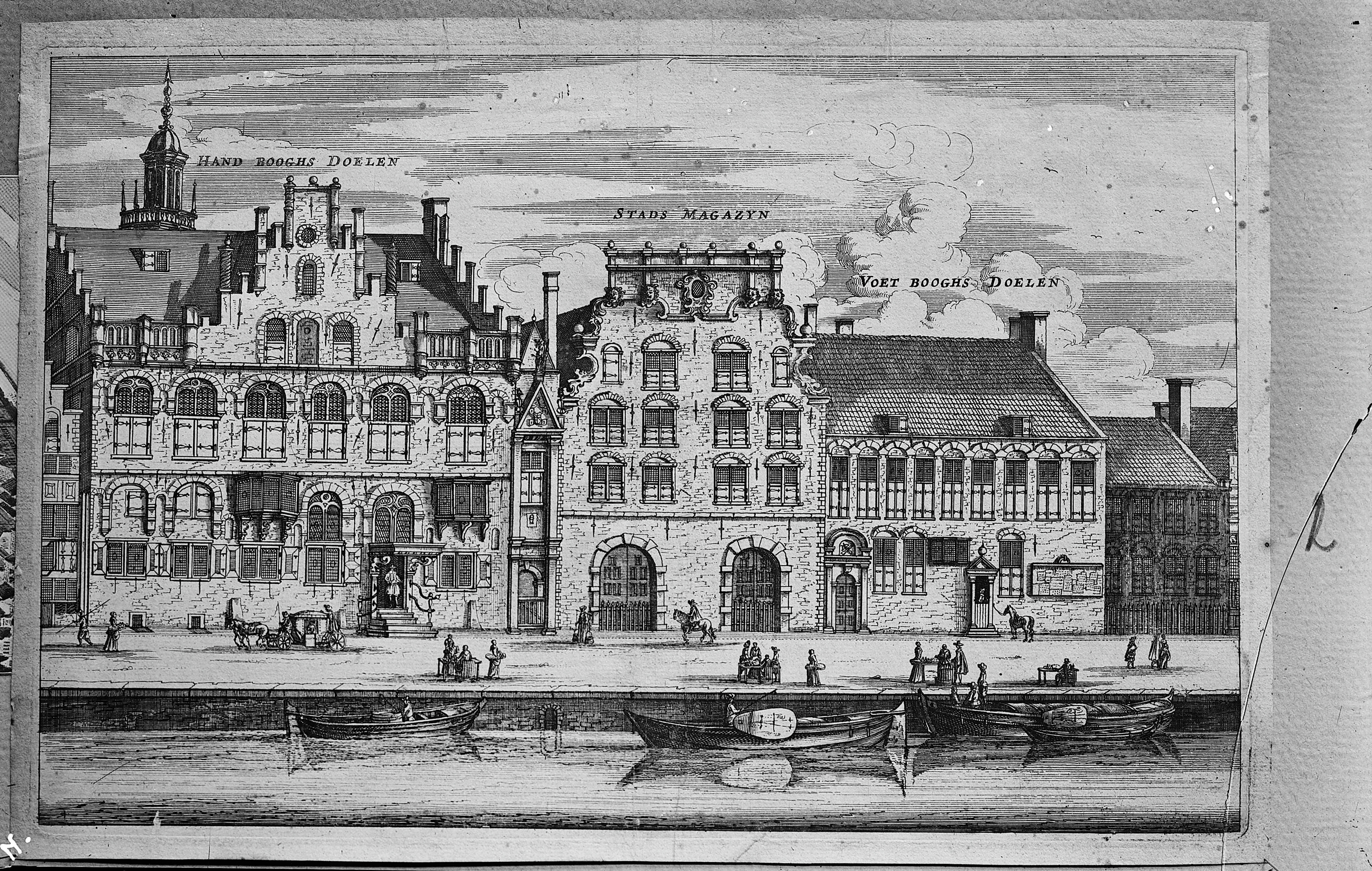 Voormalige Sint Bastiaans of Handboogdoelen: Ets van de gevelwand met voorgevels van de Hand Booghs Doelen, het Stads Magazyn en de Voet Booghs Doelen